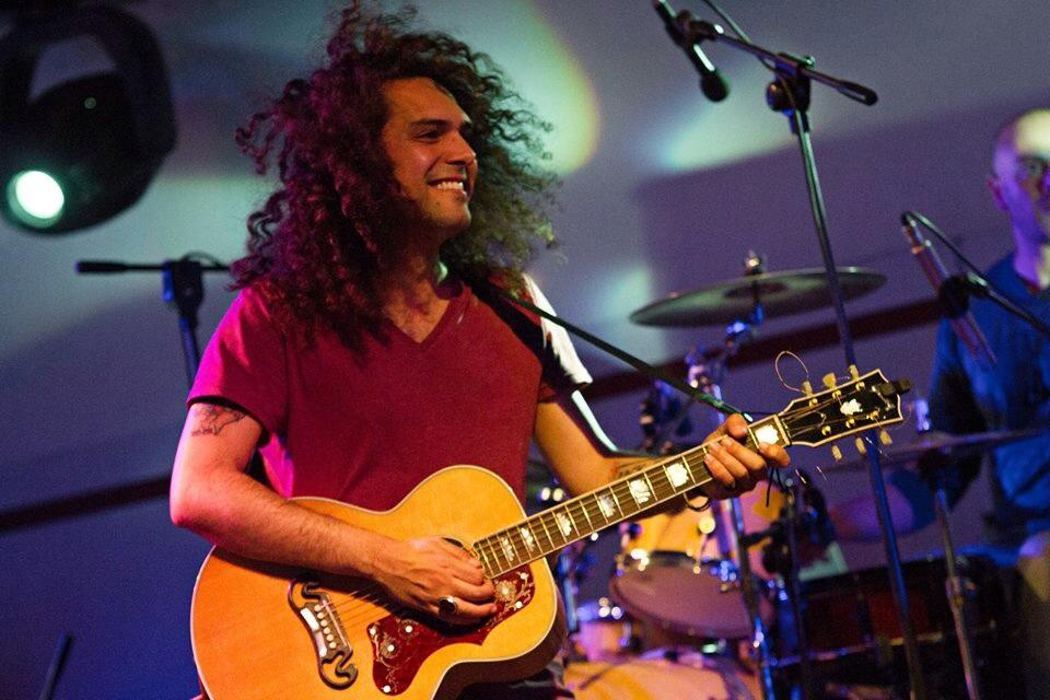 Durante un live